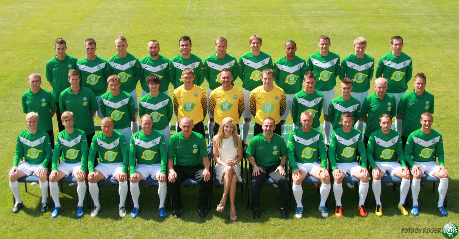 Drużyna piłkarska Warty Poznań